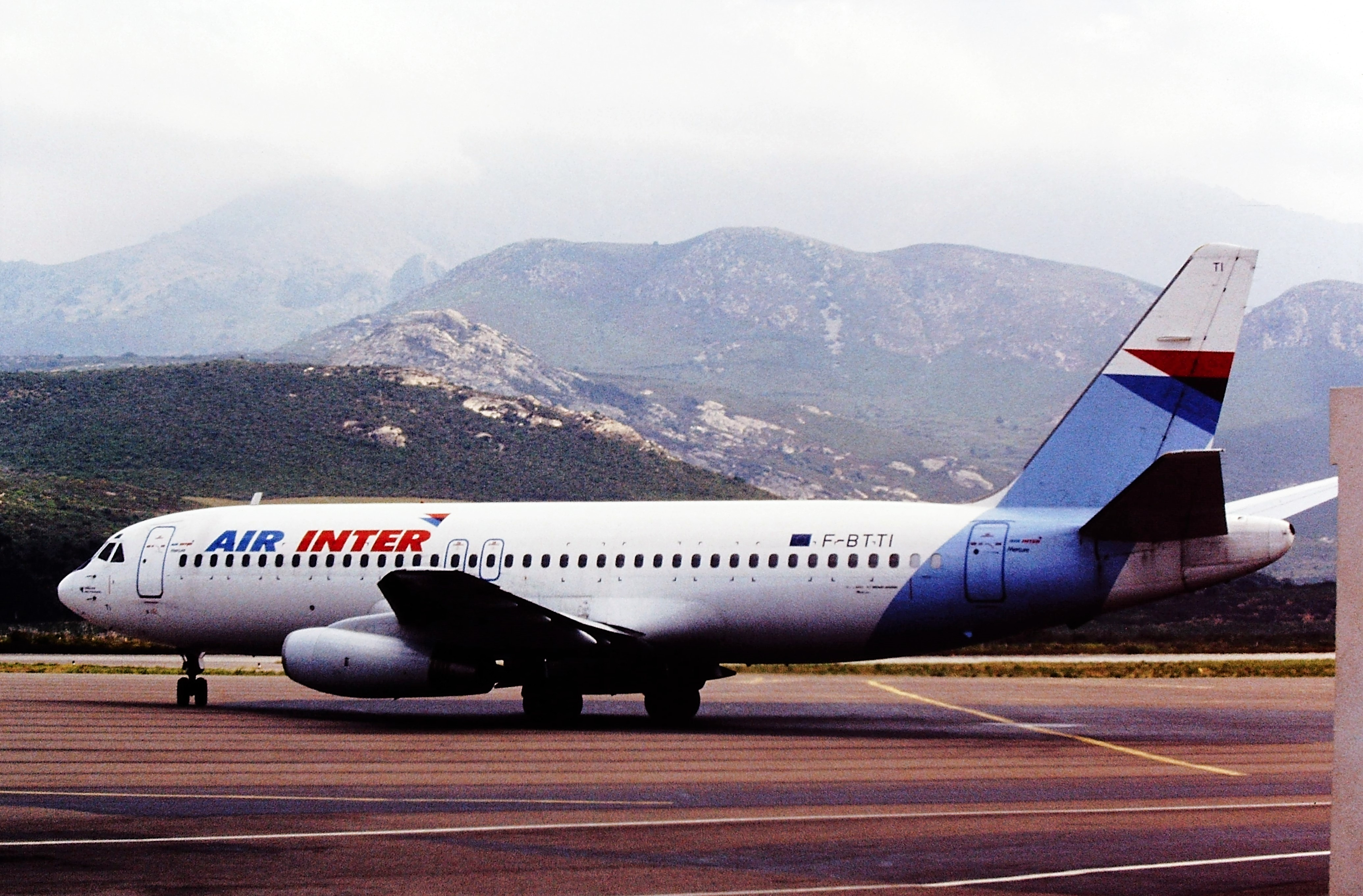 F-BTTI Dassault Mercure Air Inter Calvi Airport 08-1992